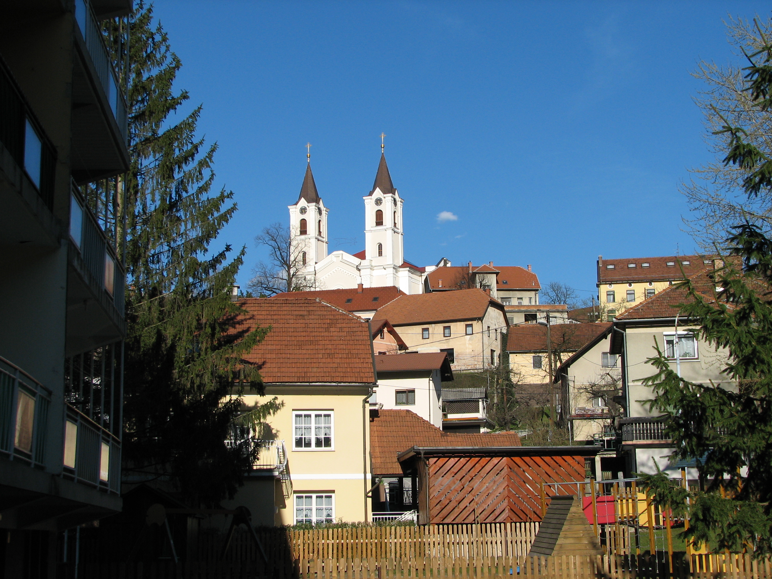 Zagorje ob Savi: pogled s Ceste zmage proti cerkvi Sv. Petra in Pavla. Avtor: romanm (talk).